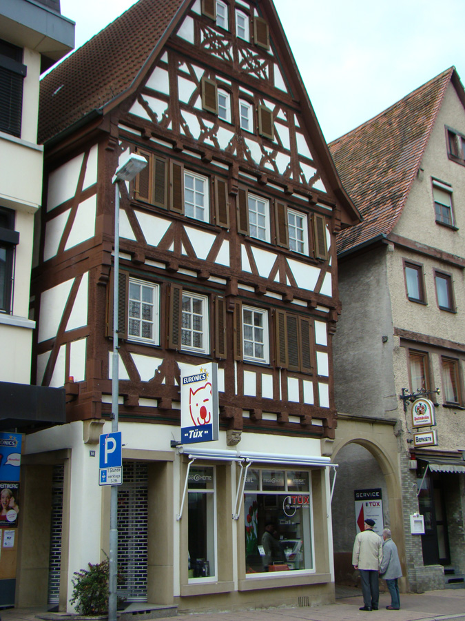 Historisches Gebäude Brettener Straße 10 in Eppingen